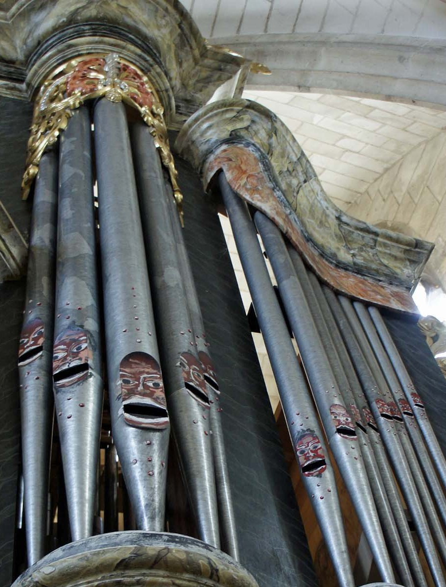 Détail des Orgues de l'église de Suippes, bouches grimaçantes.